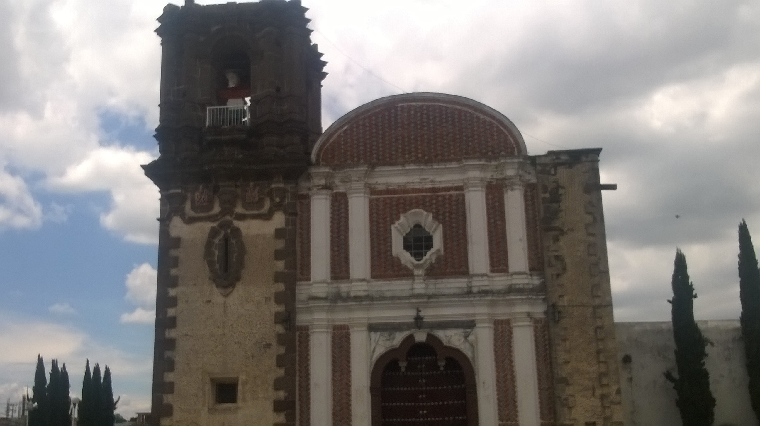 Parroquia de Santiago Apóstol, Tetla de la Solidaridad, Tlaxcala